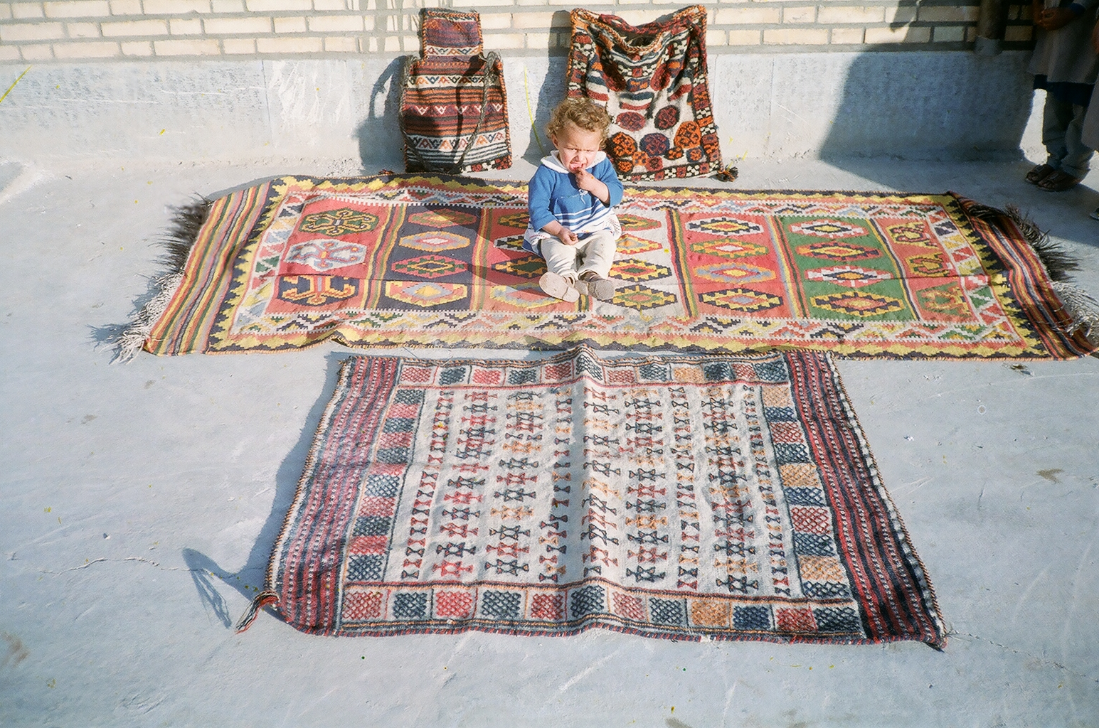 صنایع دستی ساخته شده توسط مردم لر روستای کفشکنان واقع در استان کهگیلویه و بویراحمد. که به ترتیب از بالا به پائین و از راست به چپ به قرار زیر است : جعبه دان ، نکدان یا تیوری، گلیم ، سفره